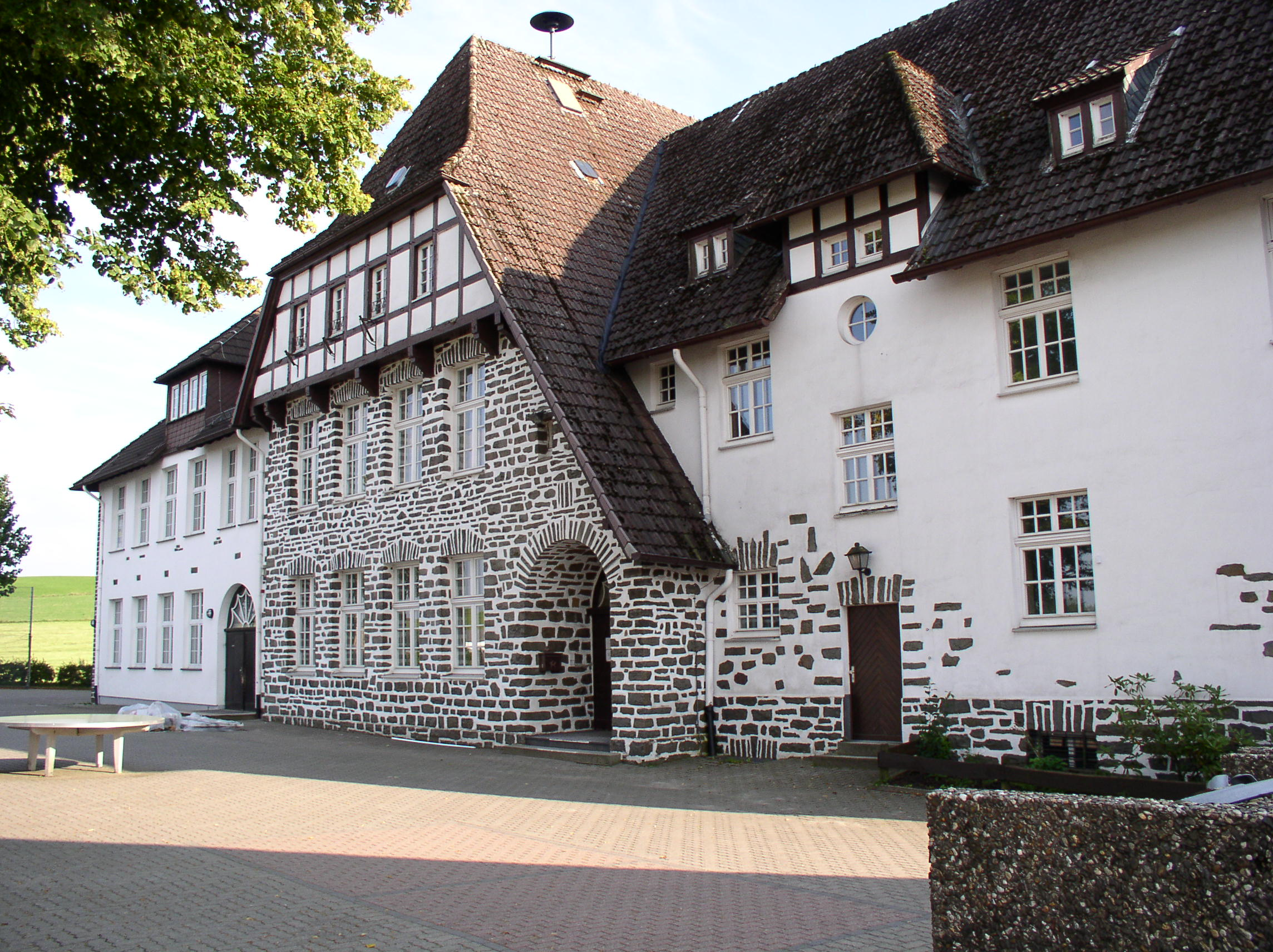 Schule in Schalksmühle Spormecke